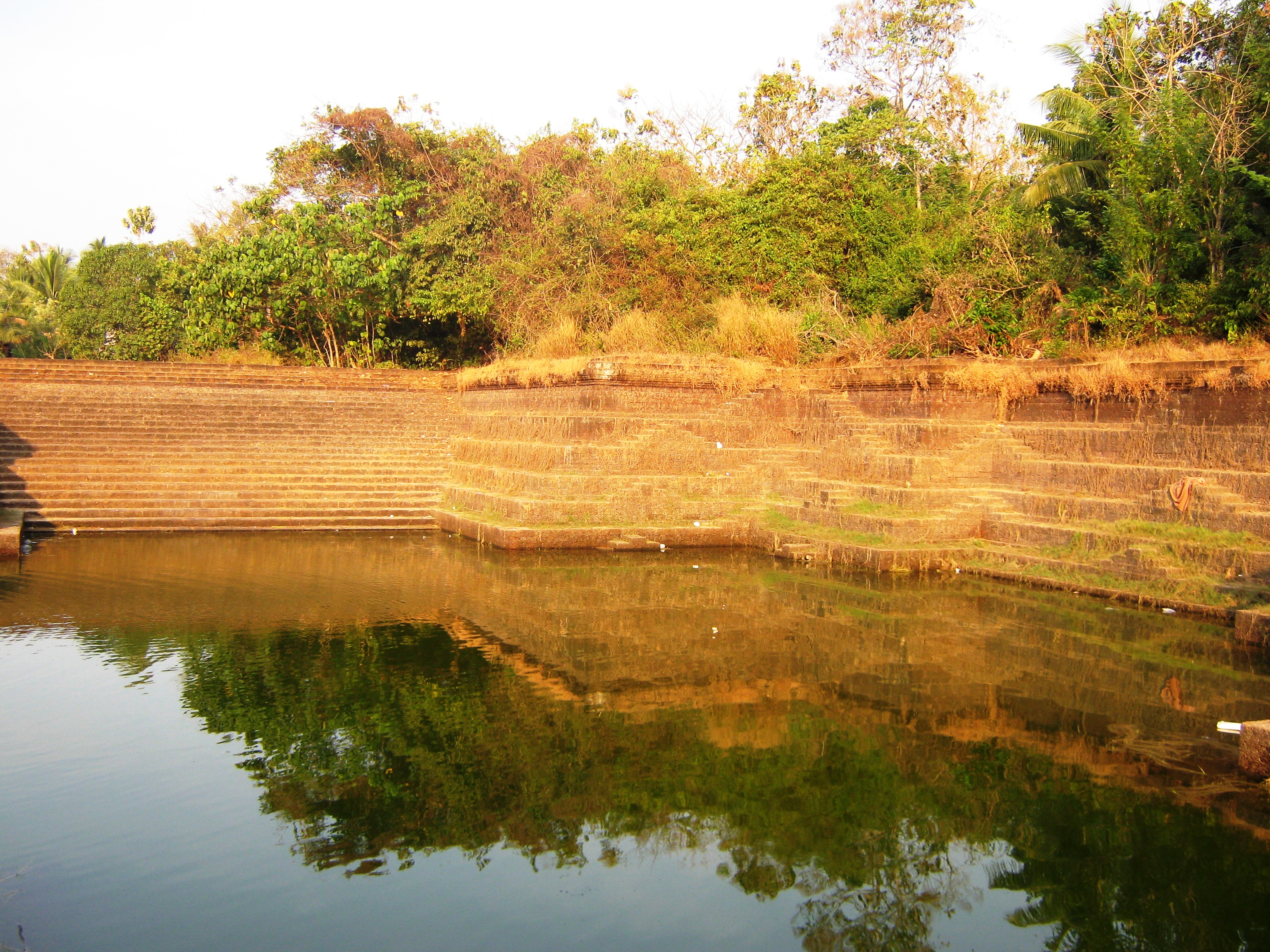 Kannur, Kerala, India.